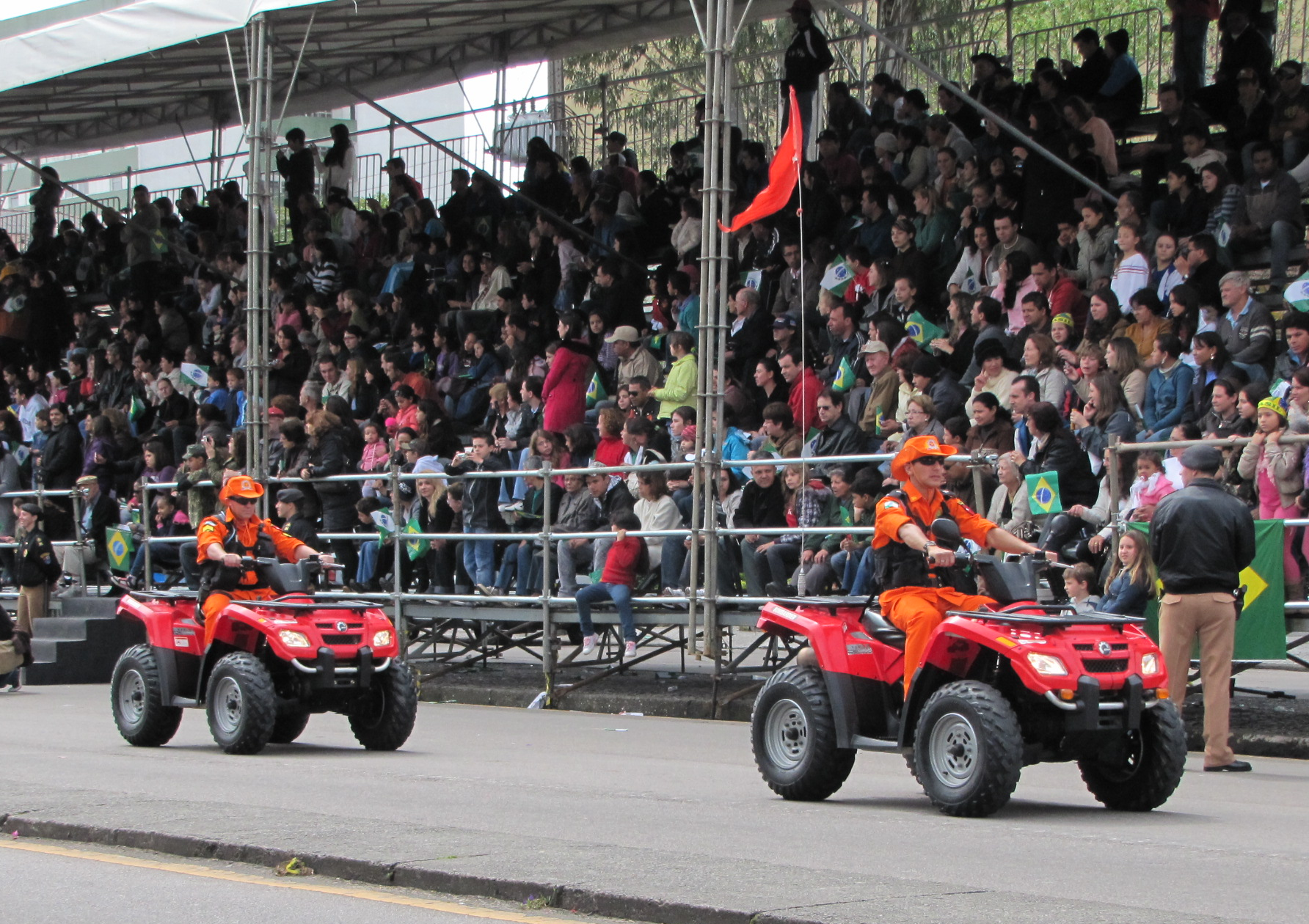 Quadriciclos do Corpo de Bombeiros do Paraná.